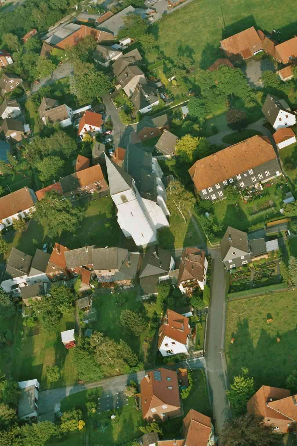 Ev. Pfarrkirche St. Othmar Dinker This is a photograph of an architectural monument.